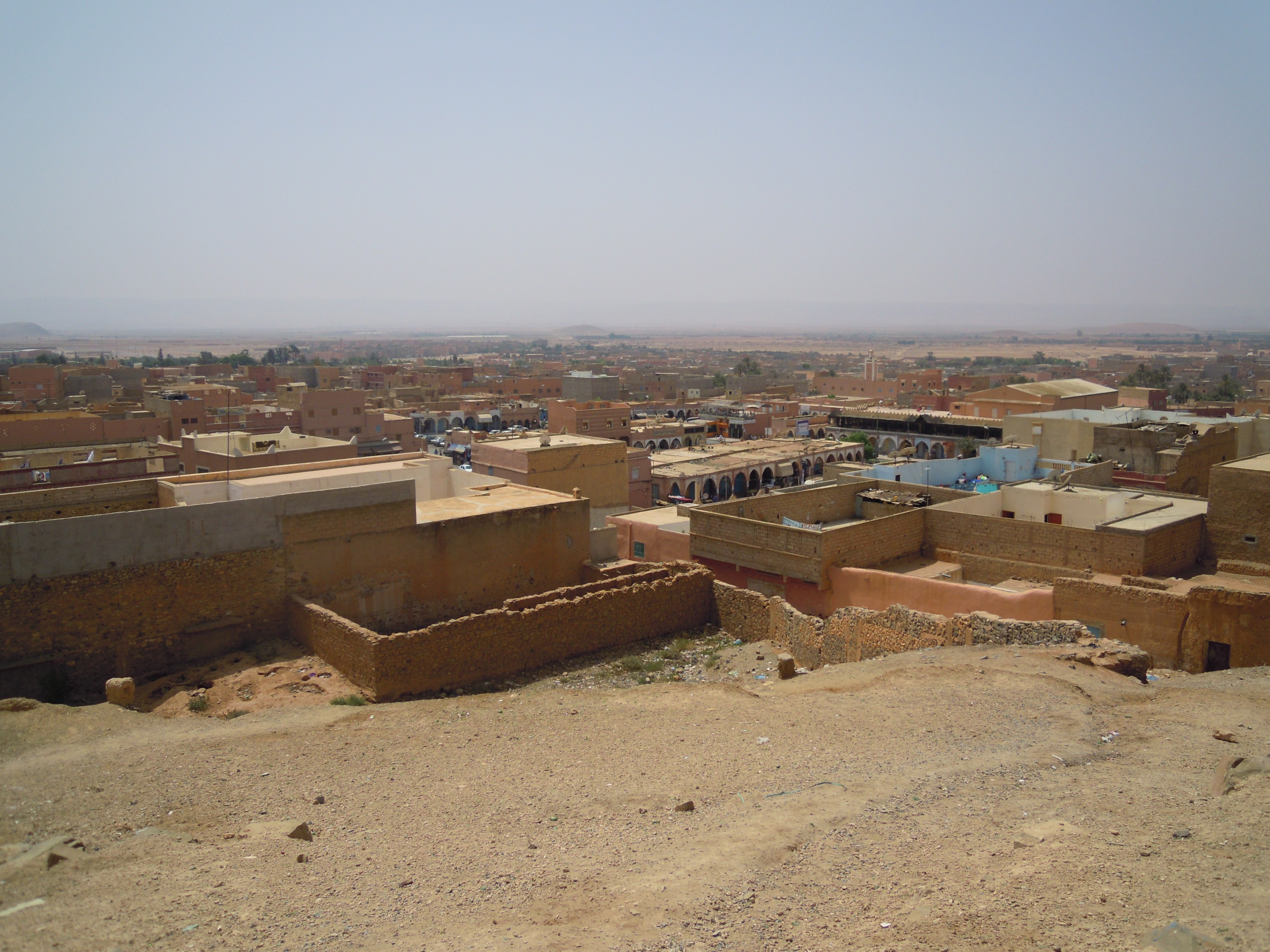 Vista de Guelmim, Marruecos